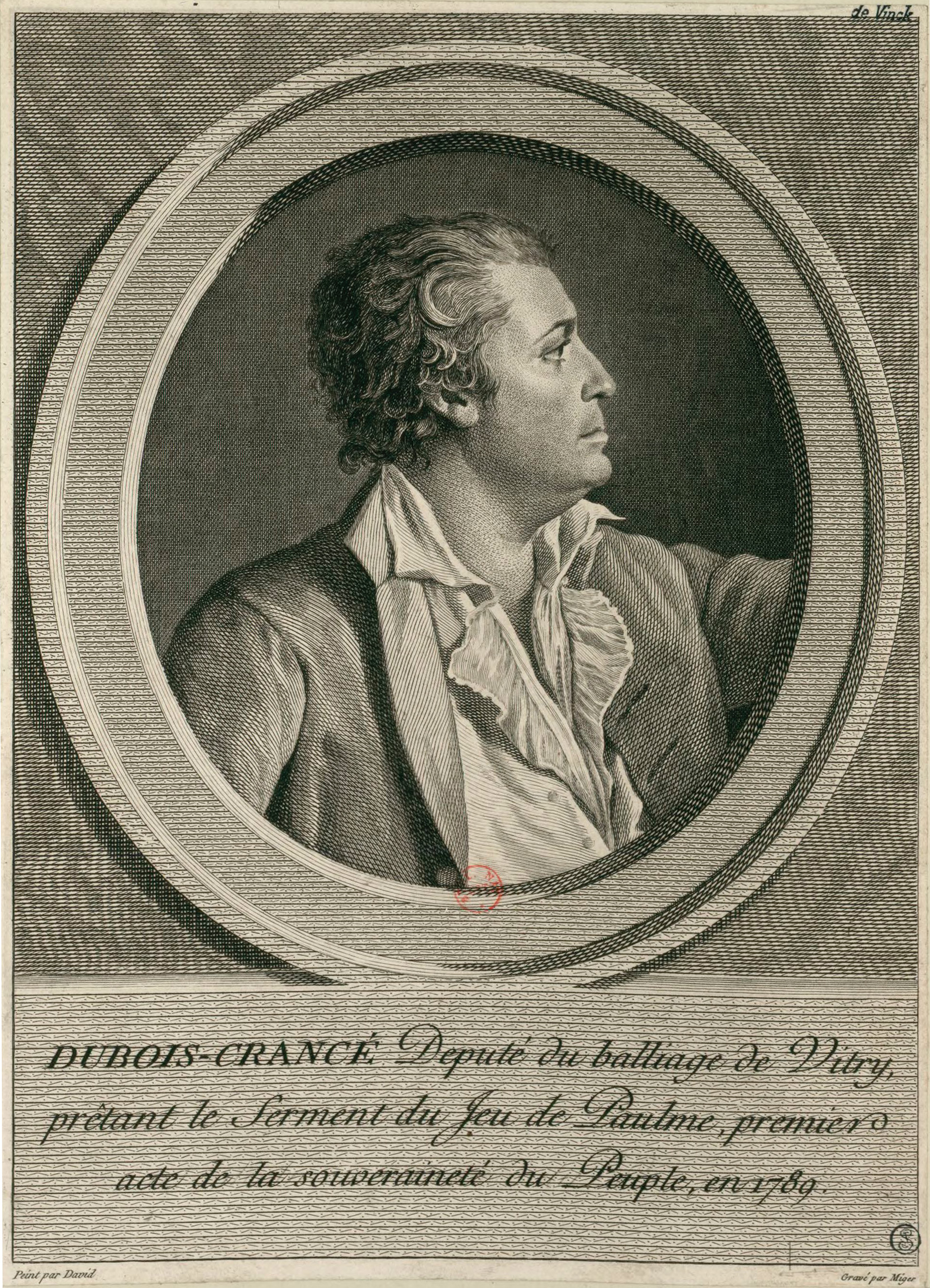 Dubois-Crancé : député du balliage de Vitry, prêtant le Serment du Jeu de Paulme, premier acte de la souveraineté du peuple, en 1789. Gravure de Simon-Charles Miger d'après le tableau de David.